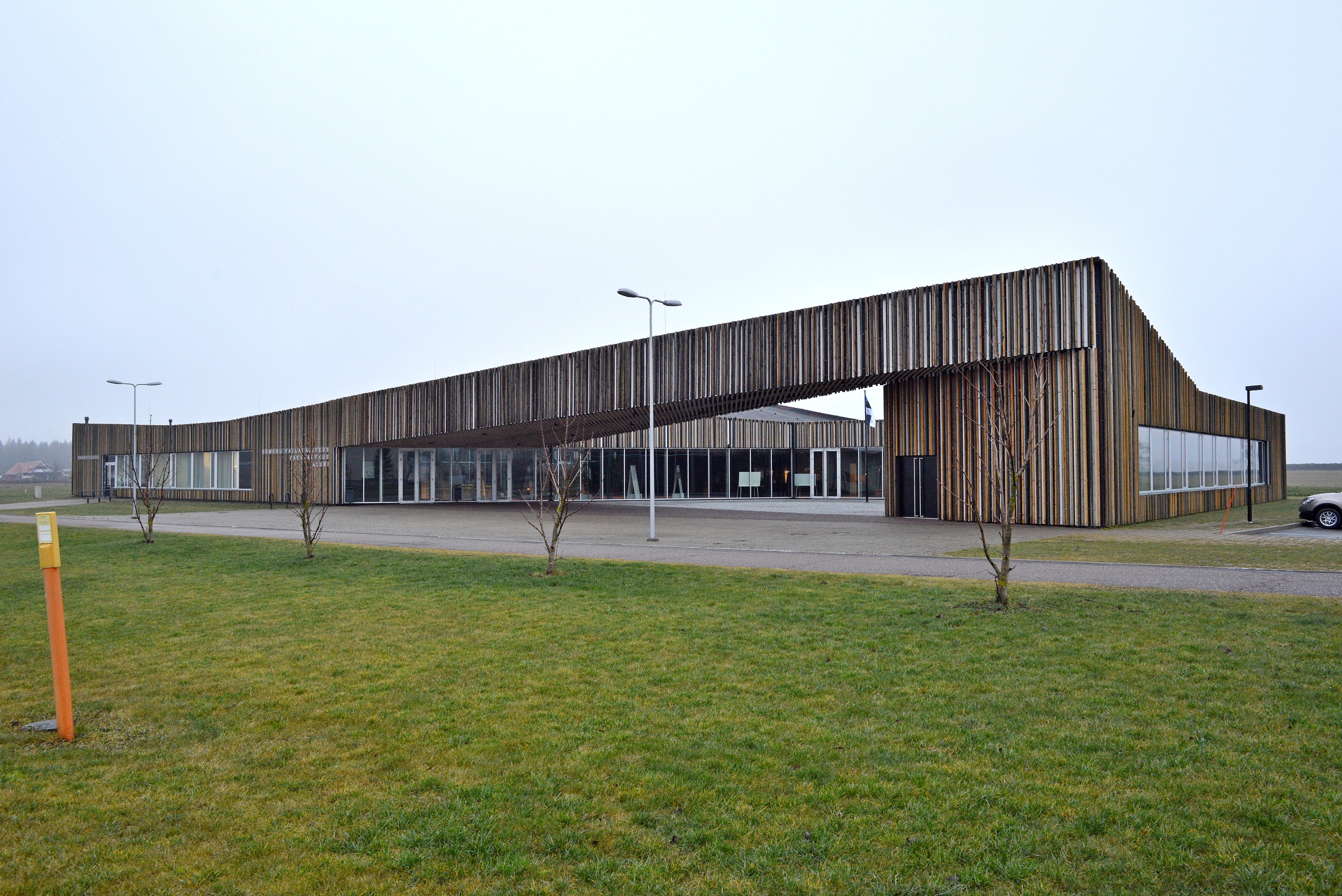 2010 valminud Sõmeru vallamaja, arhitektid Maarja Kask, Ralf Lõoke, Karli Luik, Kristiina Arusoo, Margit Argus